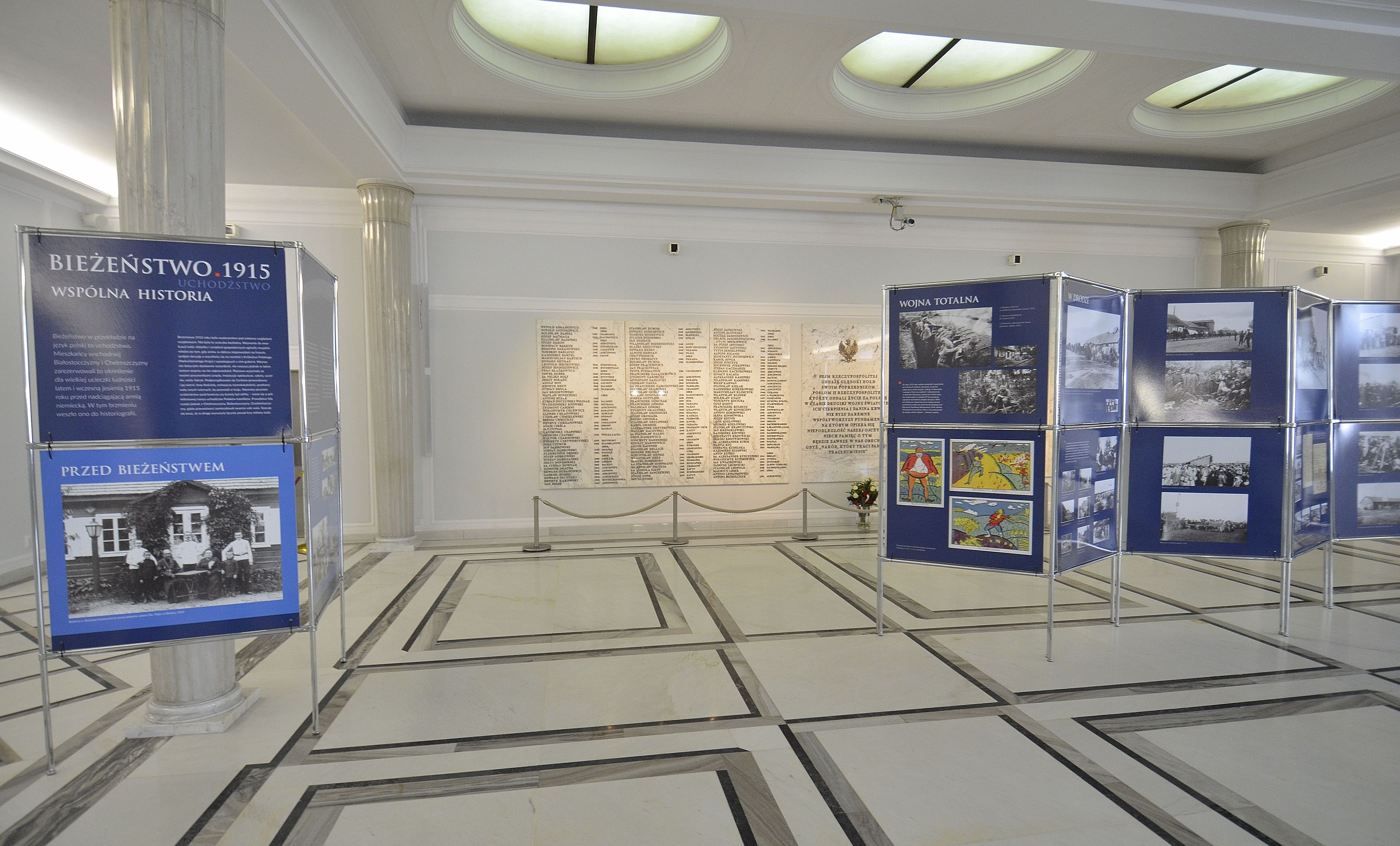 Wystawa "Bieżeństwo (uchodźstwo) 1915. Wspólna historia" w holu głównym Sejmu